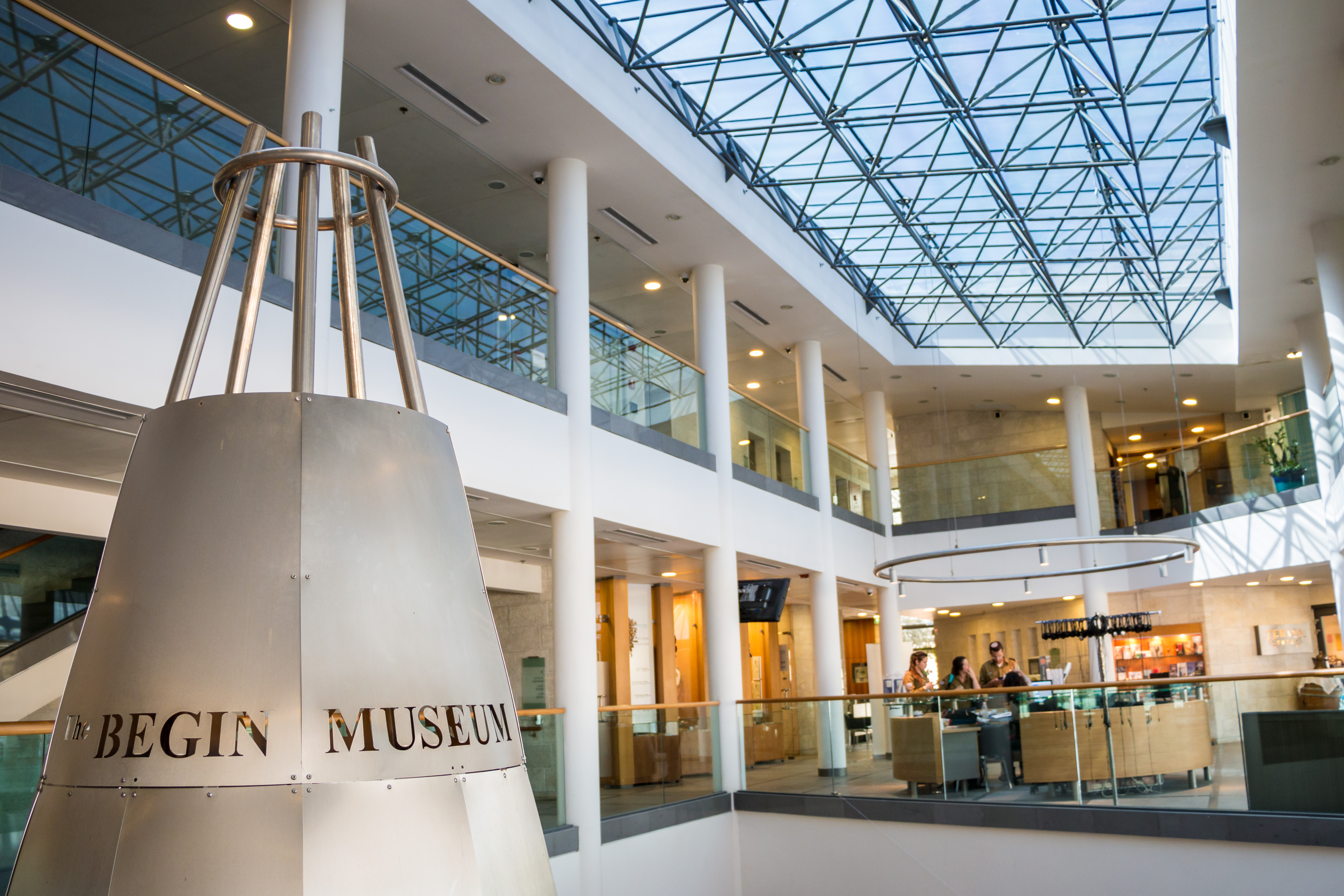 החלל המרכזי במרכז מורשת בגין